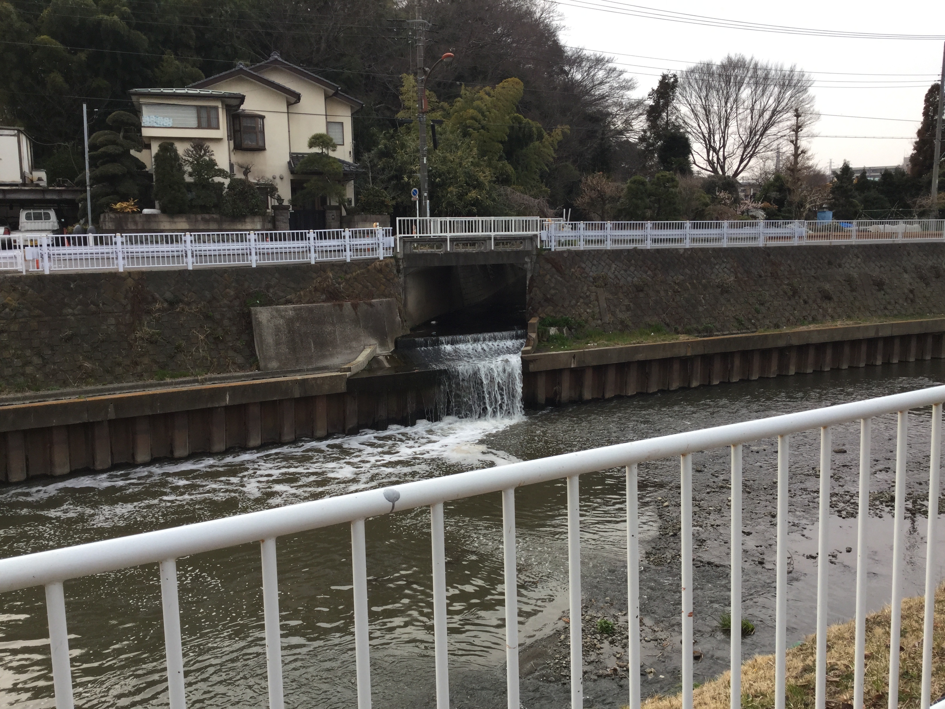 引地川と一色川合流地点と稲荷山橋（神奈川県藤沢市石川）